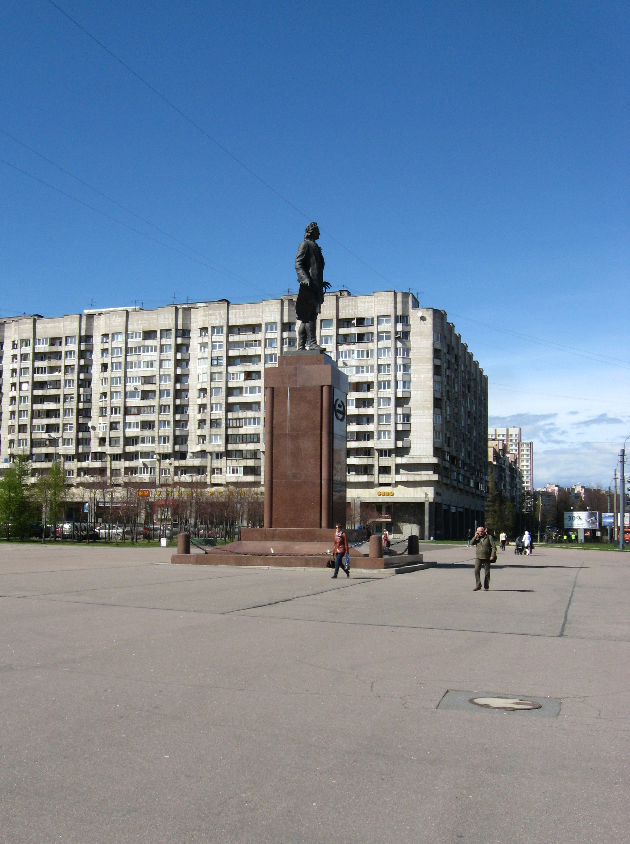 Памятник Петру I на Прибалтийской площади в Санкт-Петербурге.